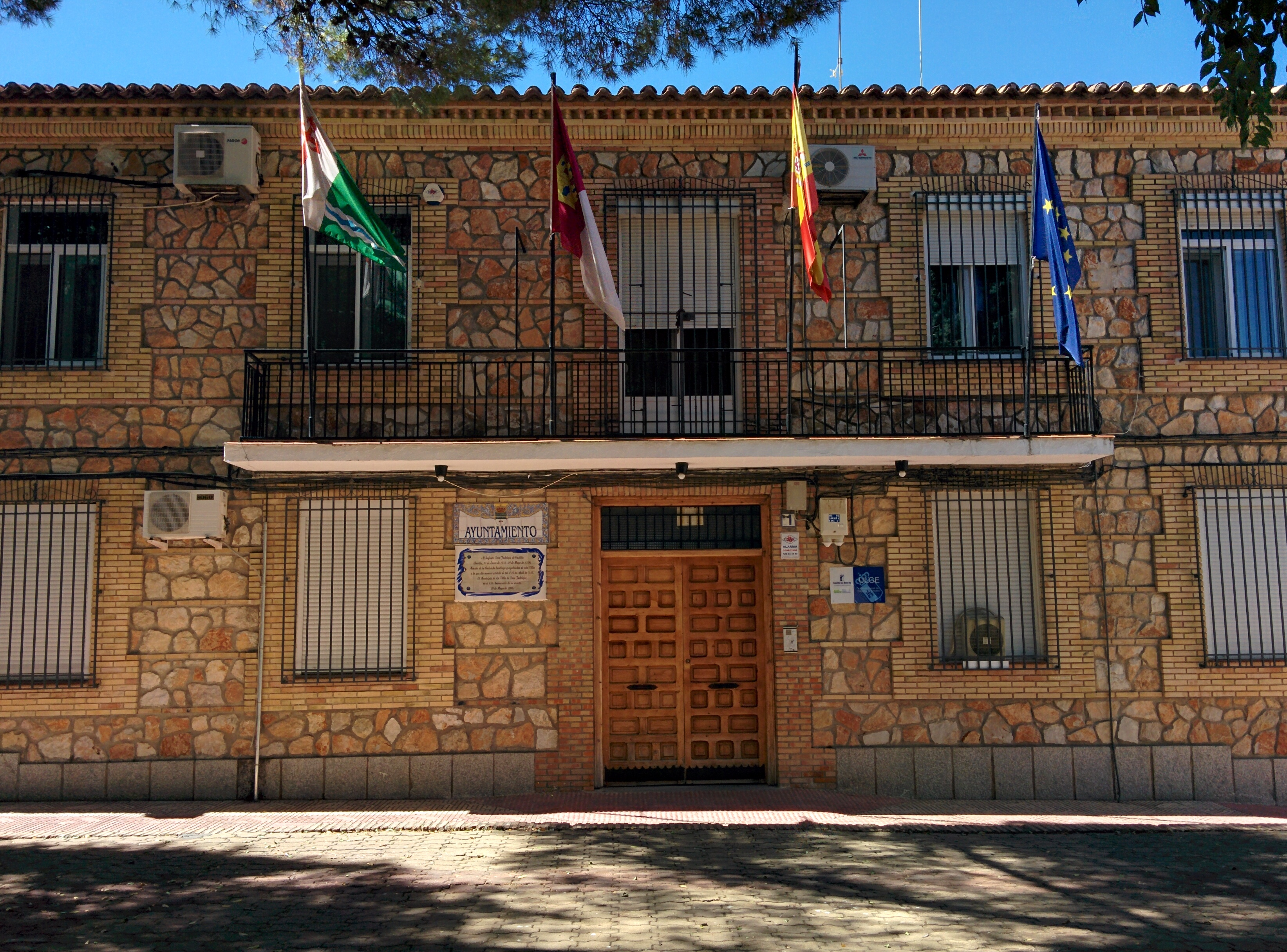 Ayuntamiento de La Villa de Don Fadrique (Toledo, España).